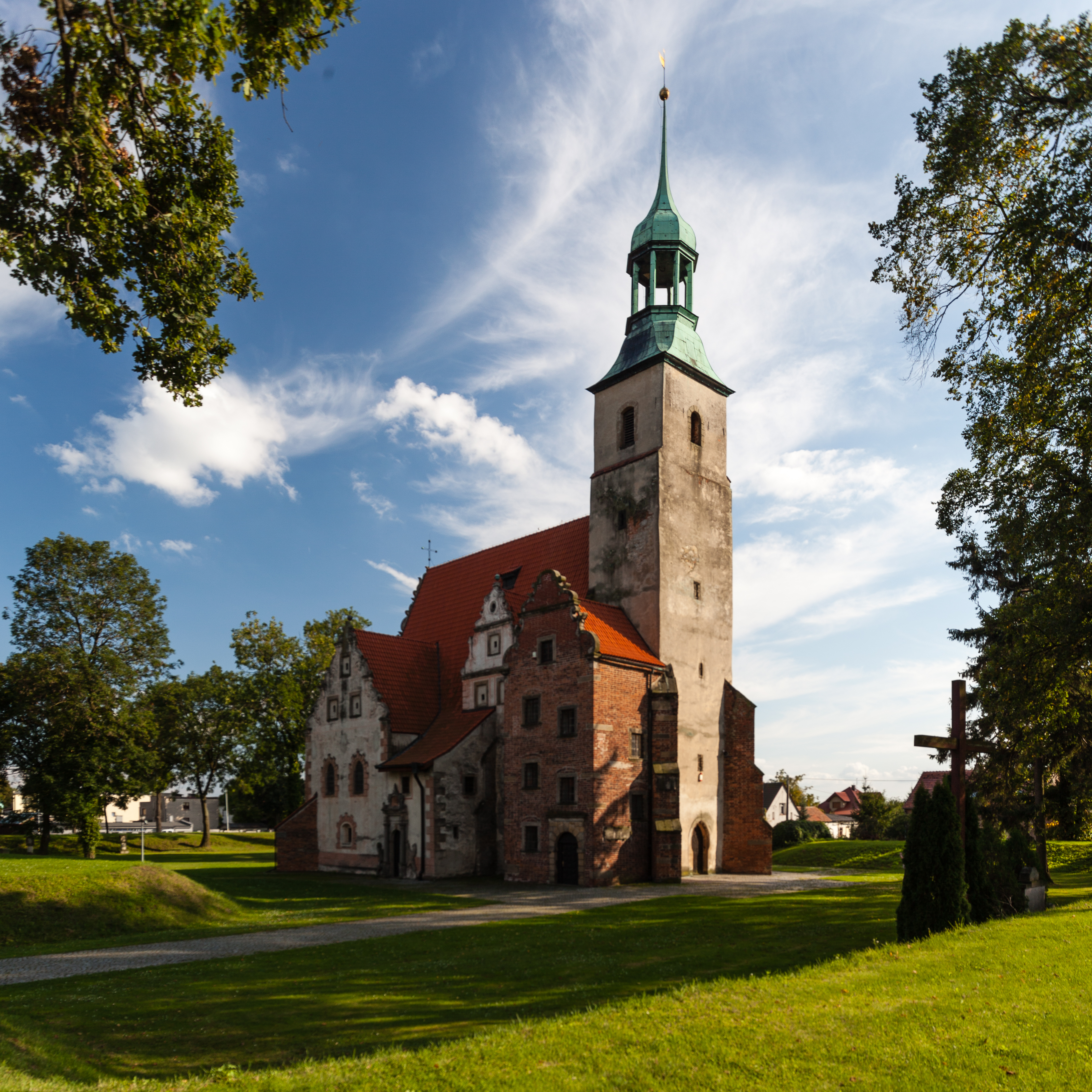 Żórawina, Al. Niepodległości - kościół pomocniczy pw. św. Trójcy (zabytek nr A/1252/88)